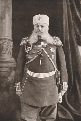 be:Мікалай Васільевіч Клейгельс